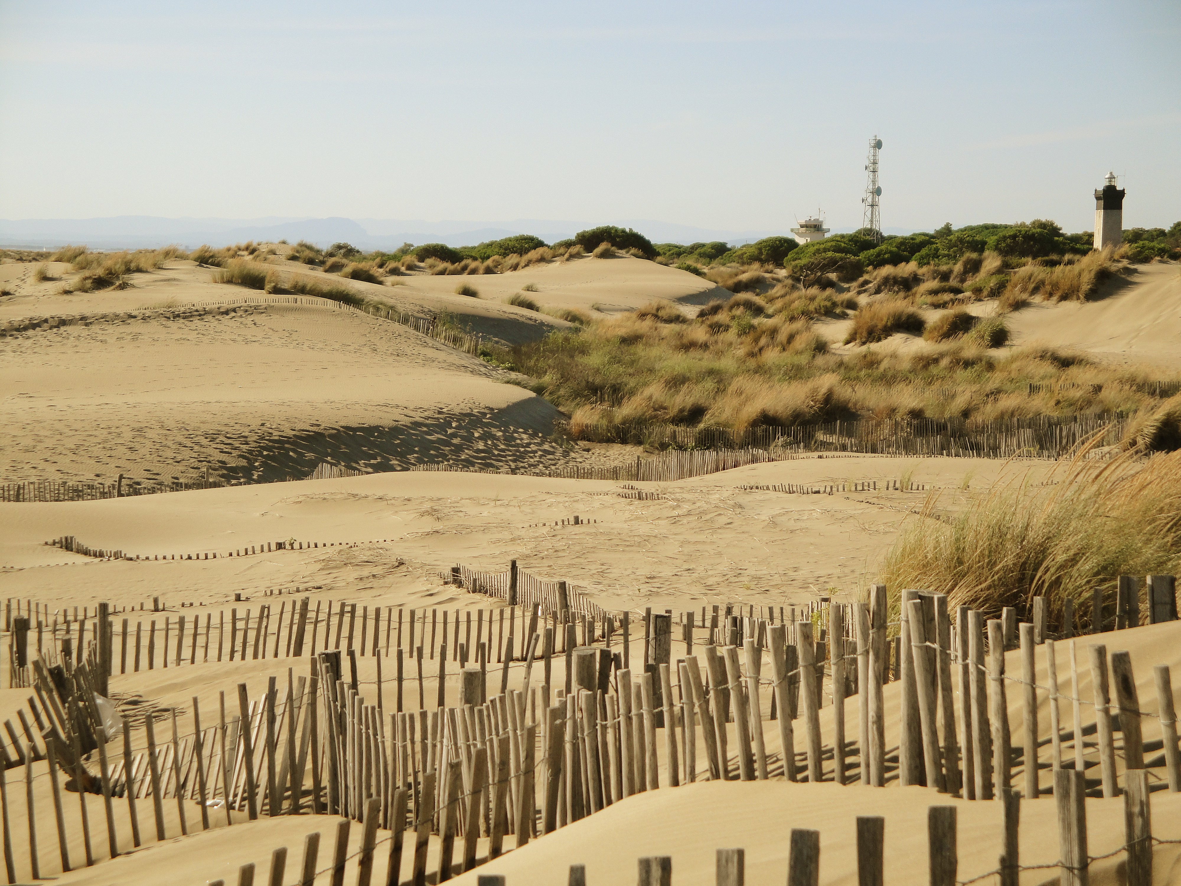 L'Espiguette !